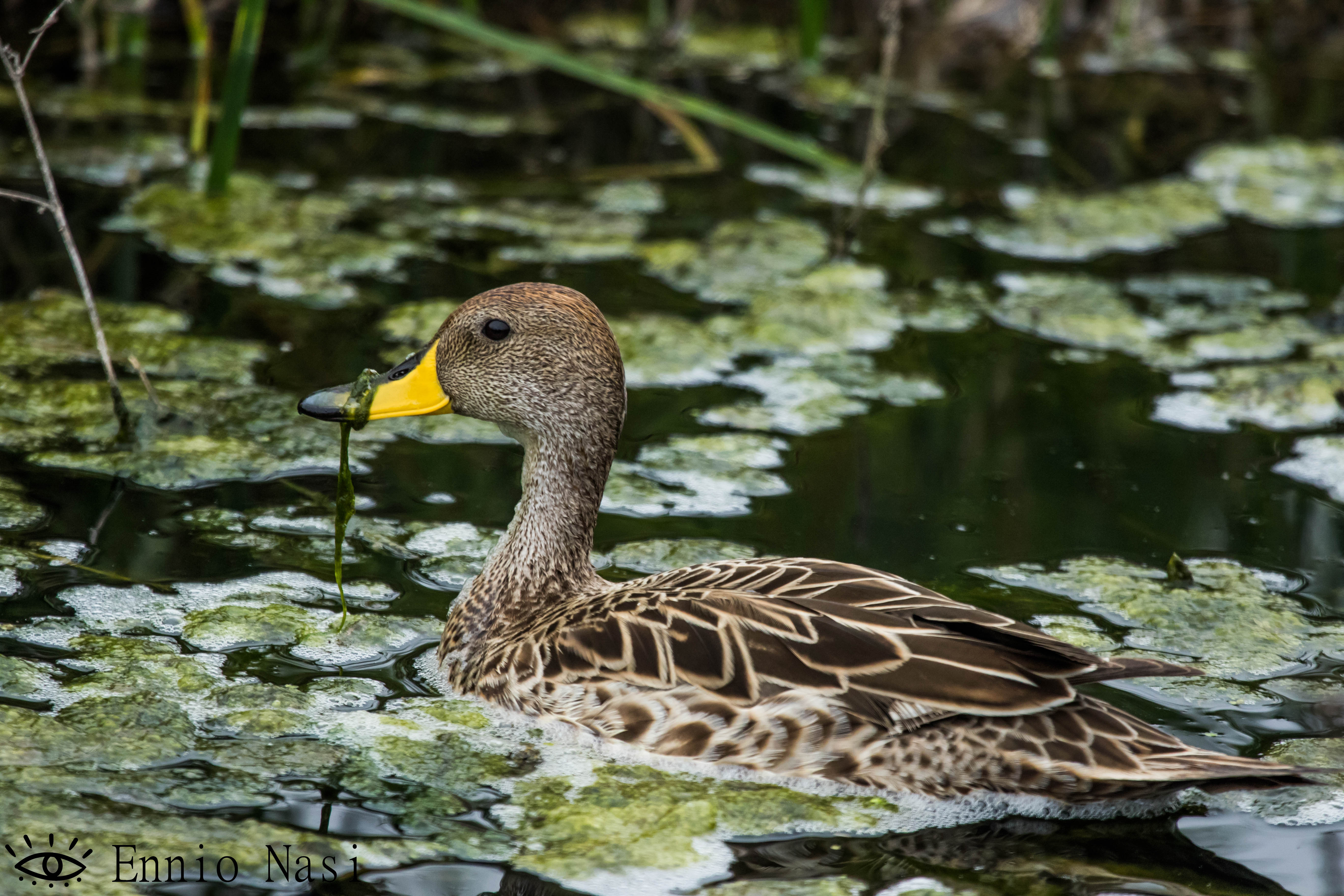 Anas flavirostris flavirostris o Jergón chico en el humedal de Batuco, Región Metropolitana, Chile.